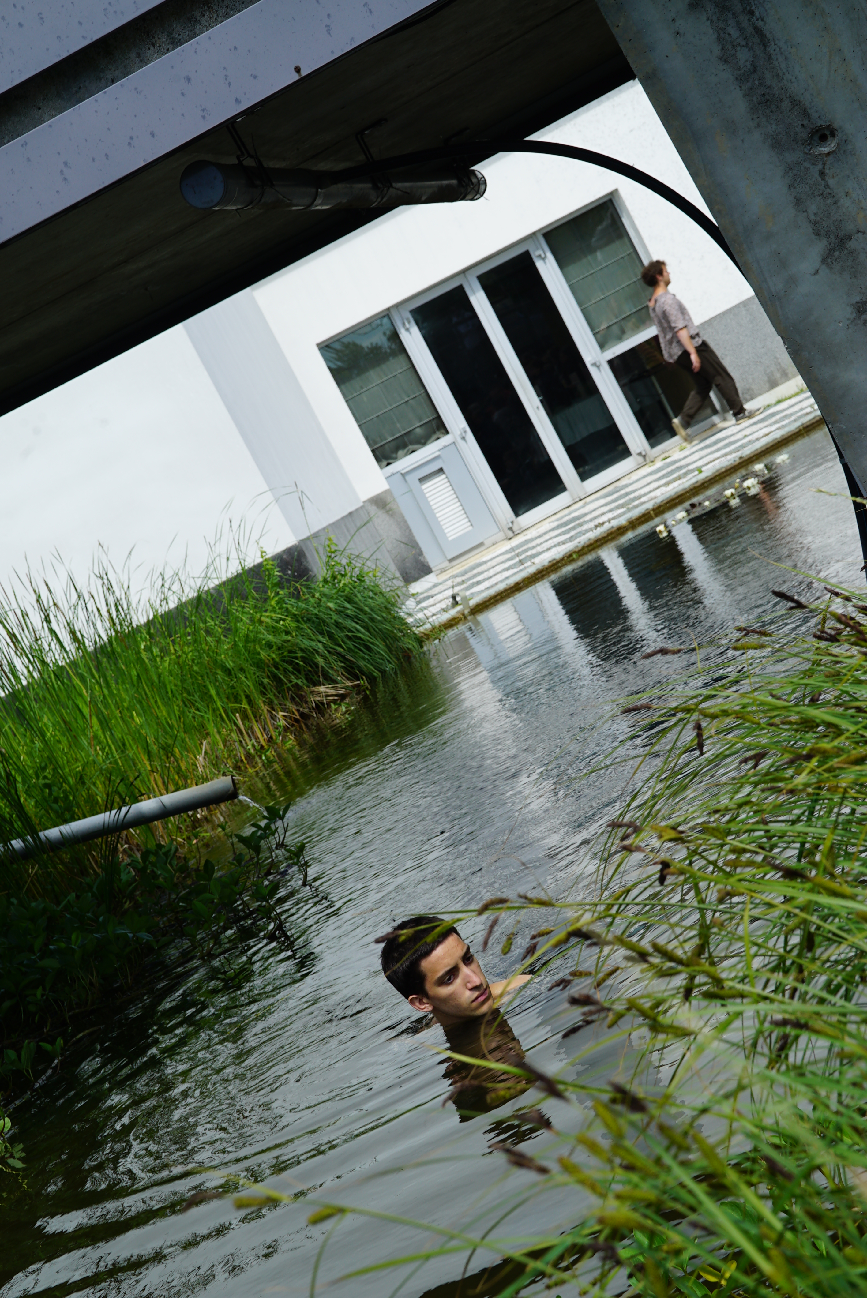 la 32e_promotion du CNAC au CFA de Châlons lors des_Furies.